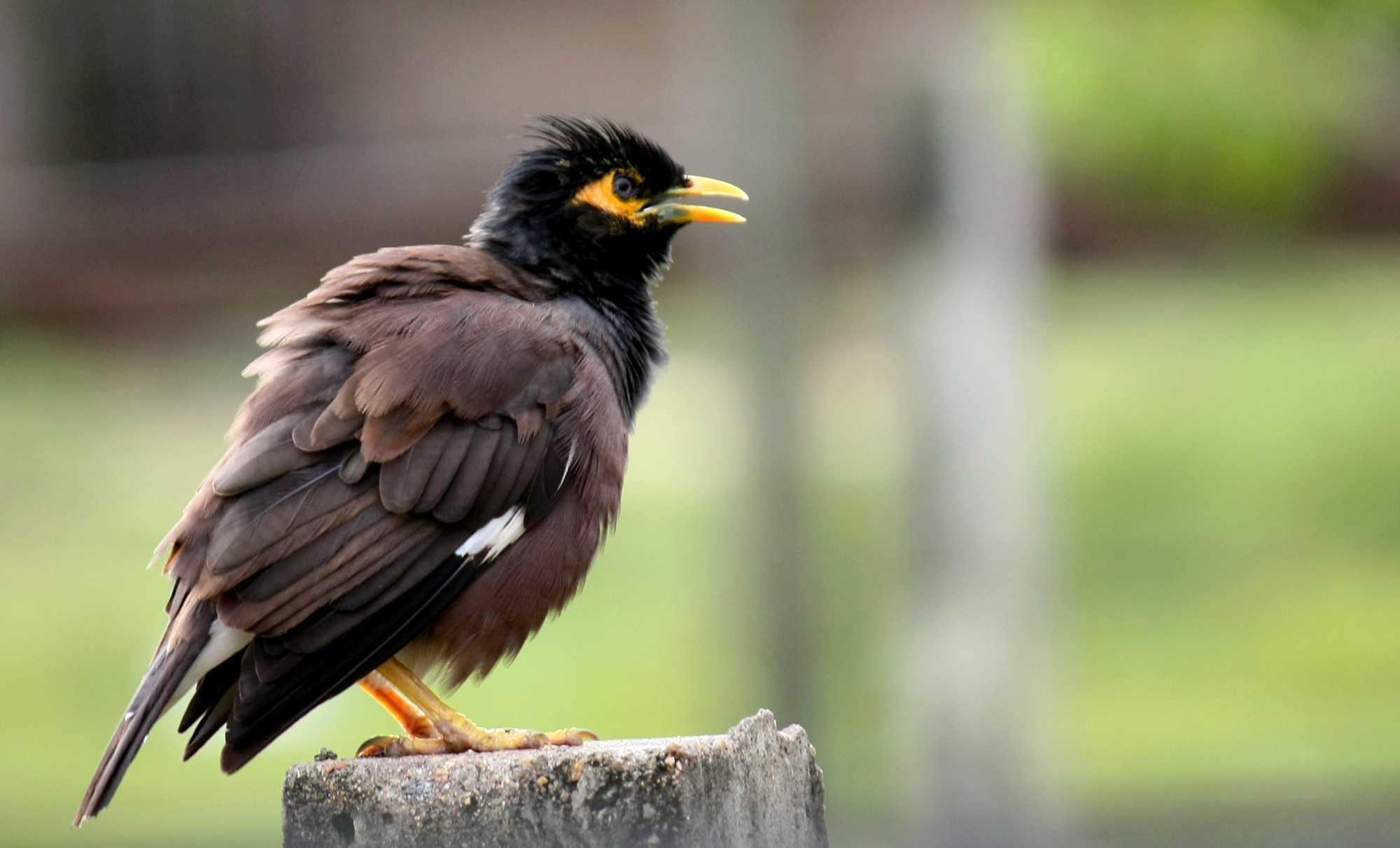 நாகனவாய் - தமிழ்நாட்டில்/ இலங்கையில் காணப்படும் பறவைகள்